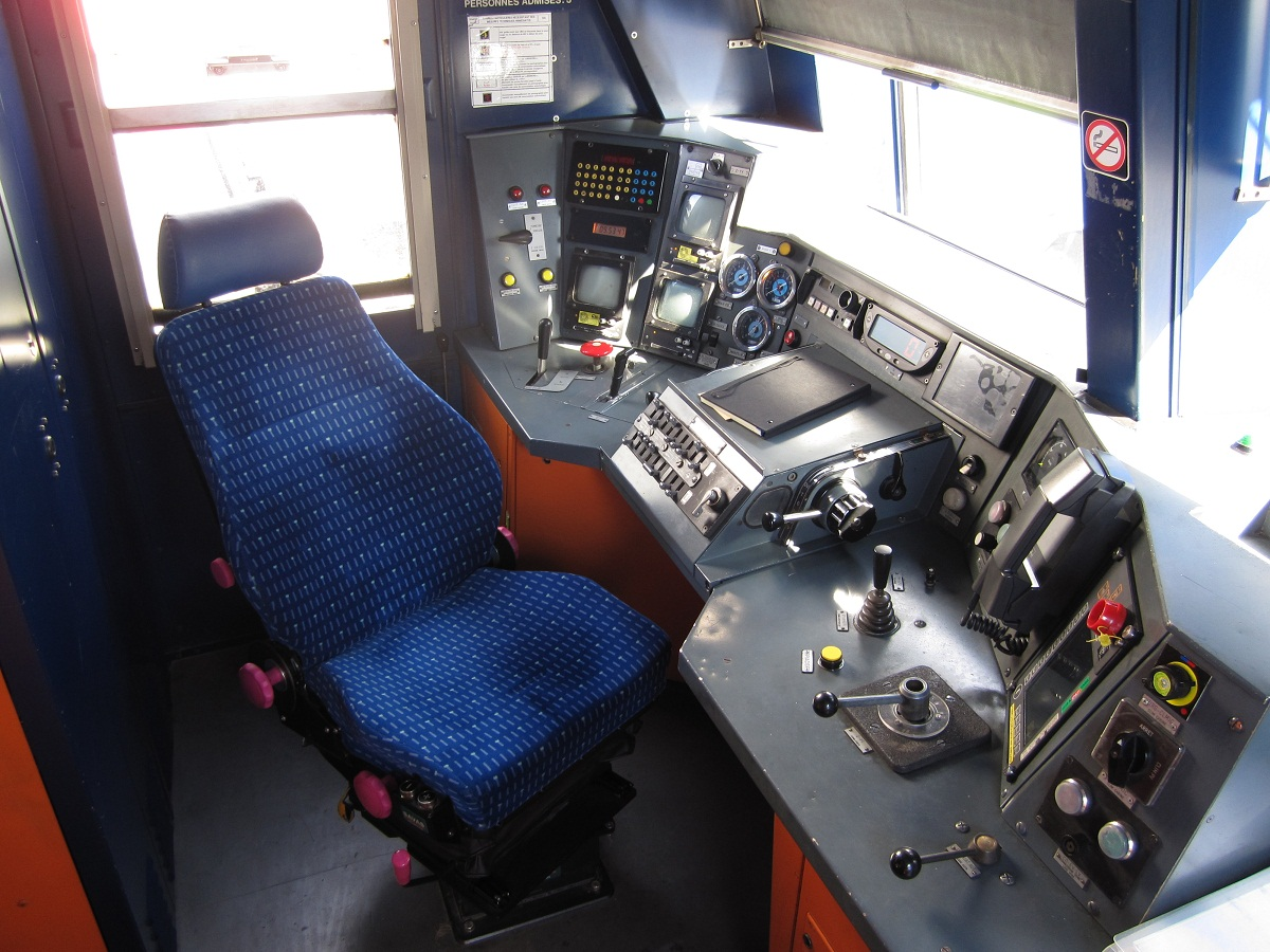 Vue de l'intérieur d'une 20500, Villetaneuse, France.